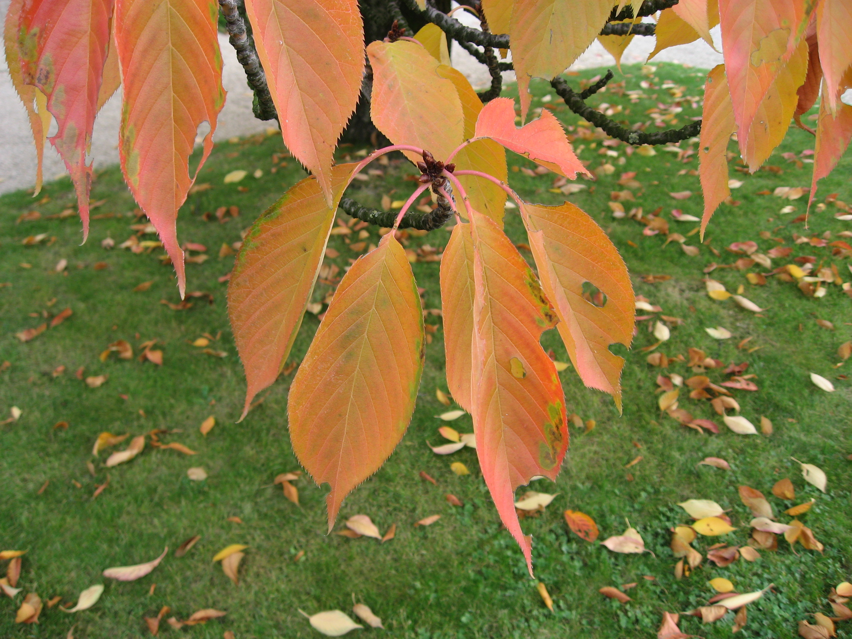 Prunus serrulata in Serres d'Auteuil